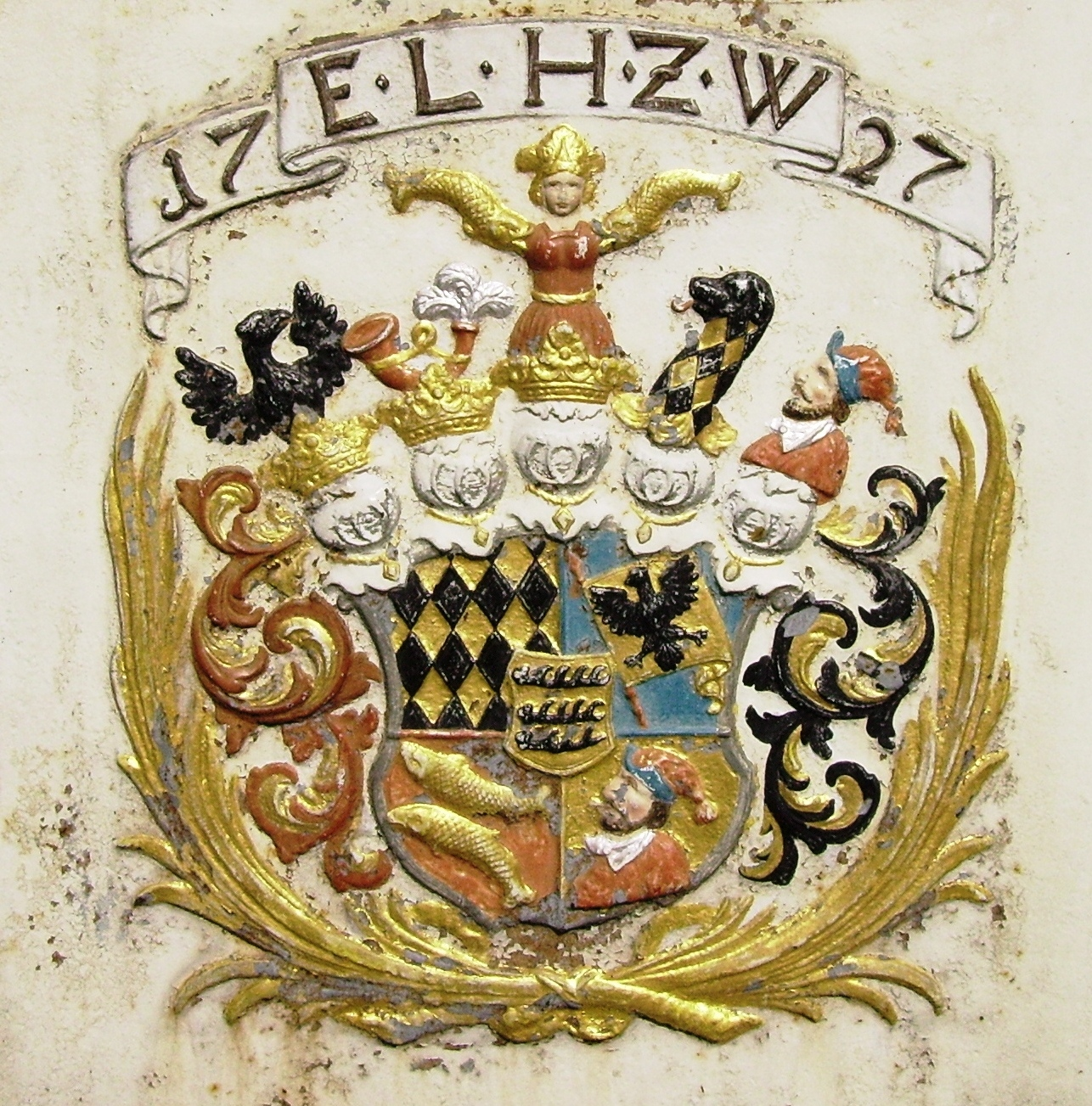 de: 1705 eingeführtes Wappen Herzog Eberhard Ludwigs von Württemberg am Röhrenbrunnen in Feuchtwangen (1727) Um den württembergischen Herzschild die Herrschaften Teck, Grüningen, Mömpelgard und Heidenheim. Darüber als Helmzier die drei Grafschaften Grüningen, Württemberg und Mömpelgard (mit Grafenkronen), das Herzogtum Teck und die Herrschaft Heidenheim (von links nach rechts). en: Coat of arms of duke Eberhard Ludwig of Württemberg 1727 on the fountain of the market place of Feuchtwangen/Bavaria